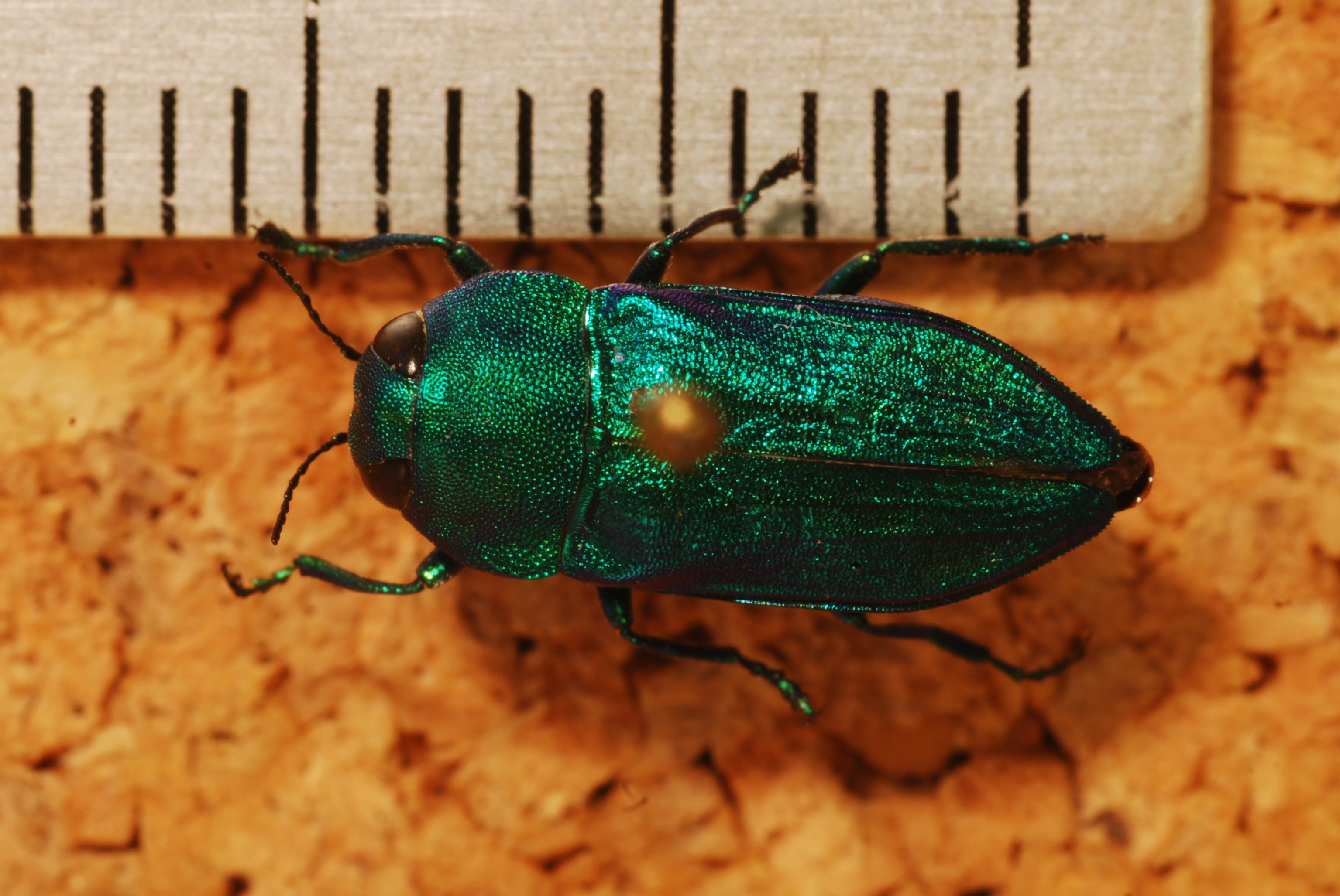 El Manzano, Santiago, CHILE